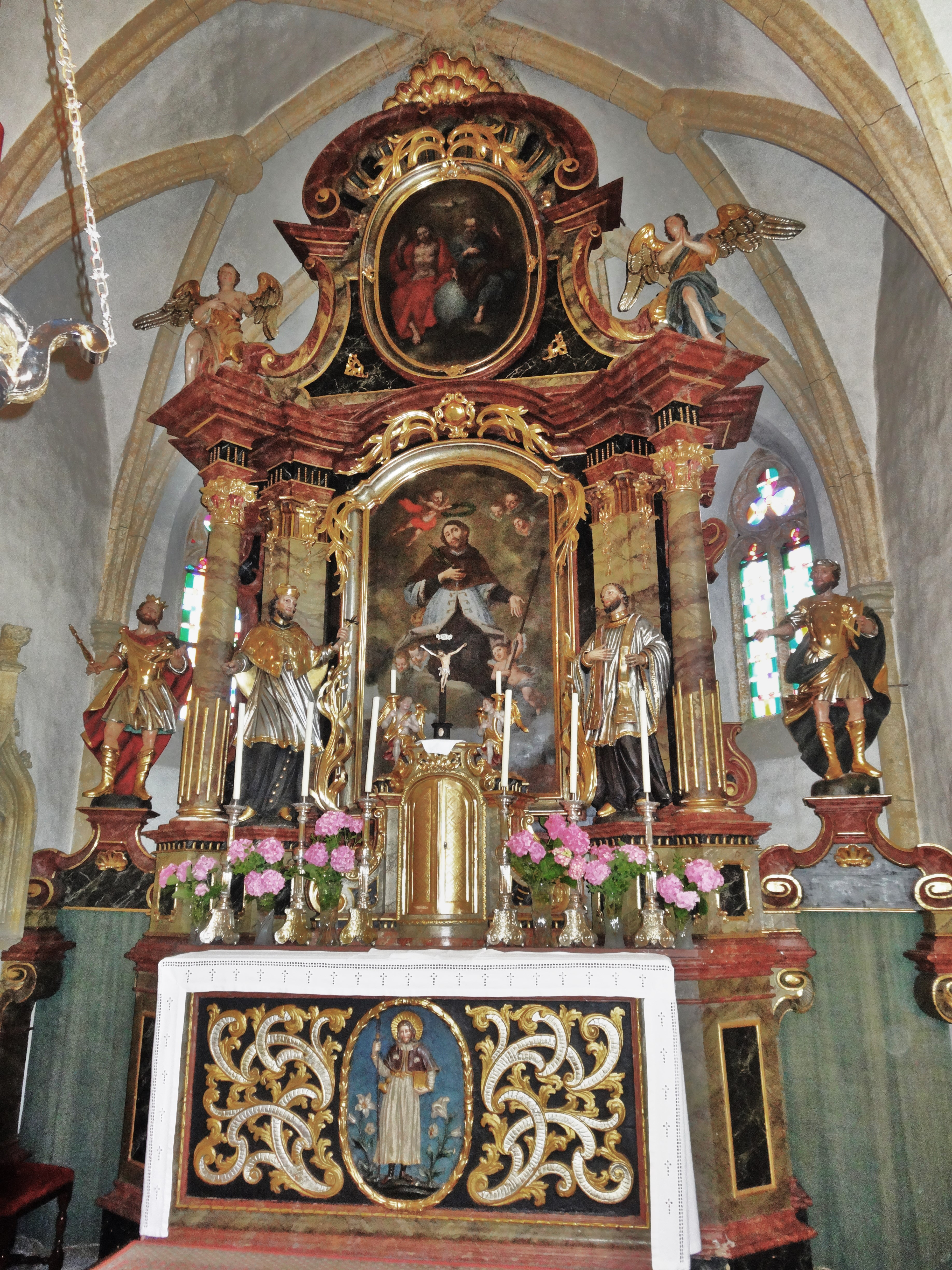 Kath. Pfarrkirche hl. Gandolf , Glanegg, der Hochalter